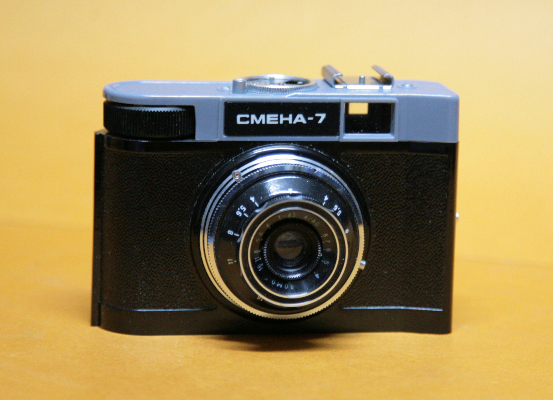 Coll. Marcè CL - LOMO Smena 7 1969-1971